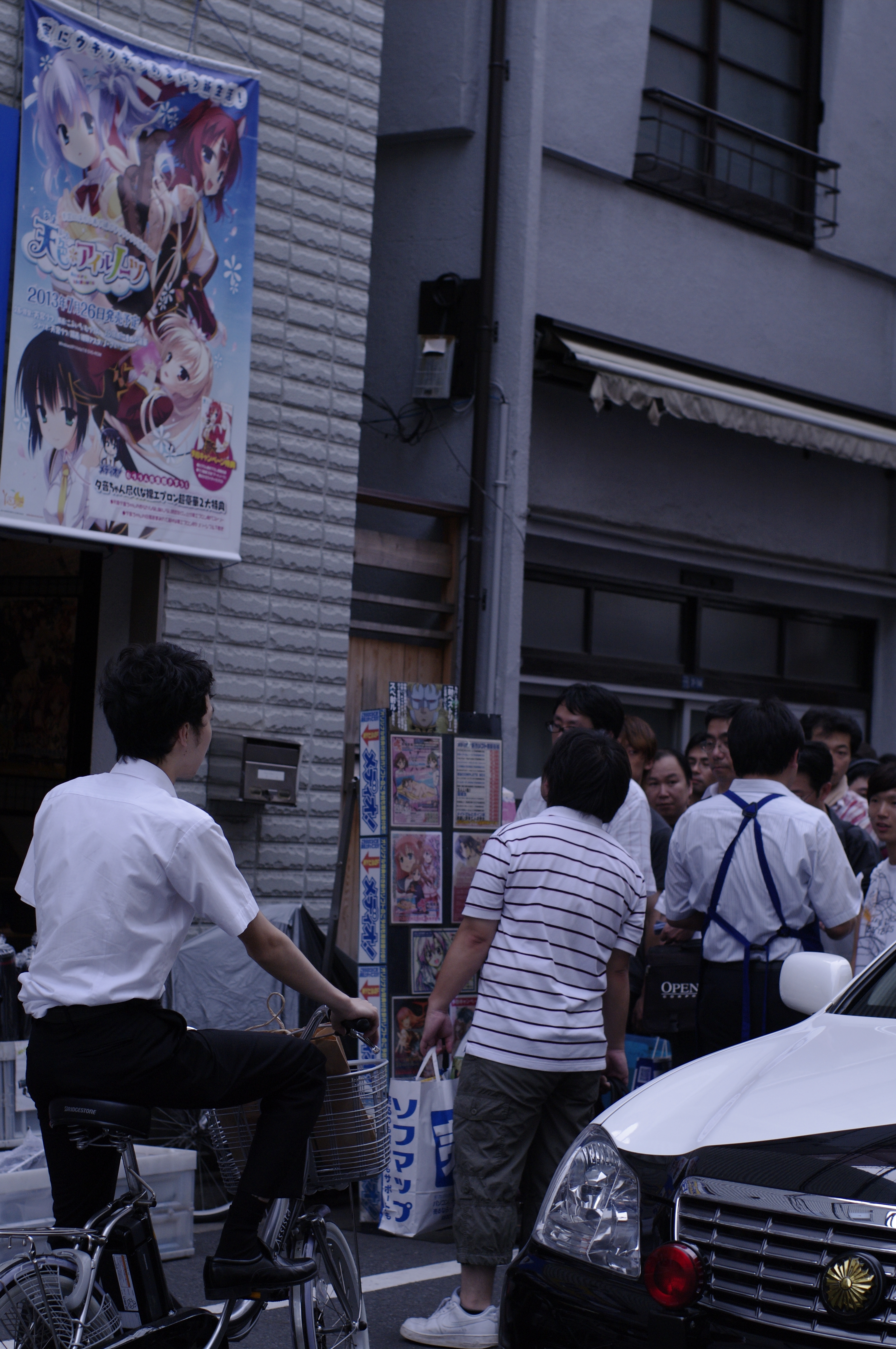 並んでるの初めて見た